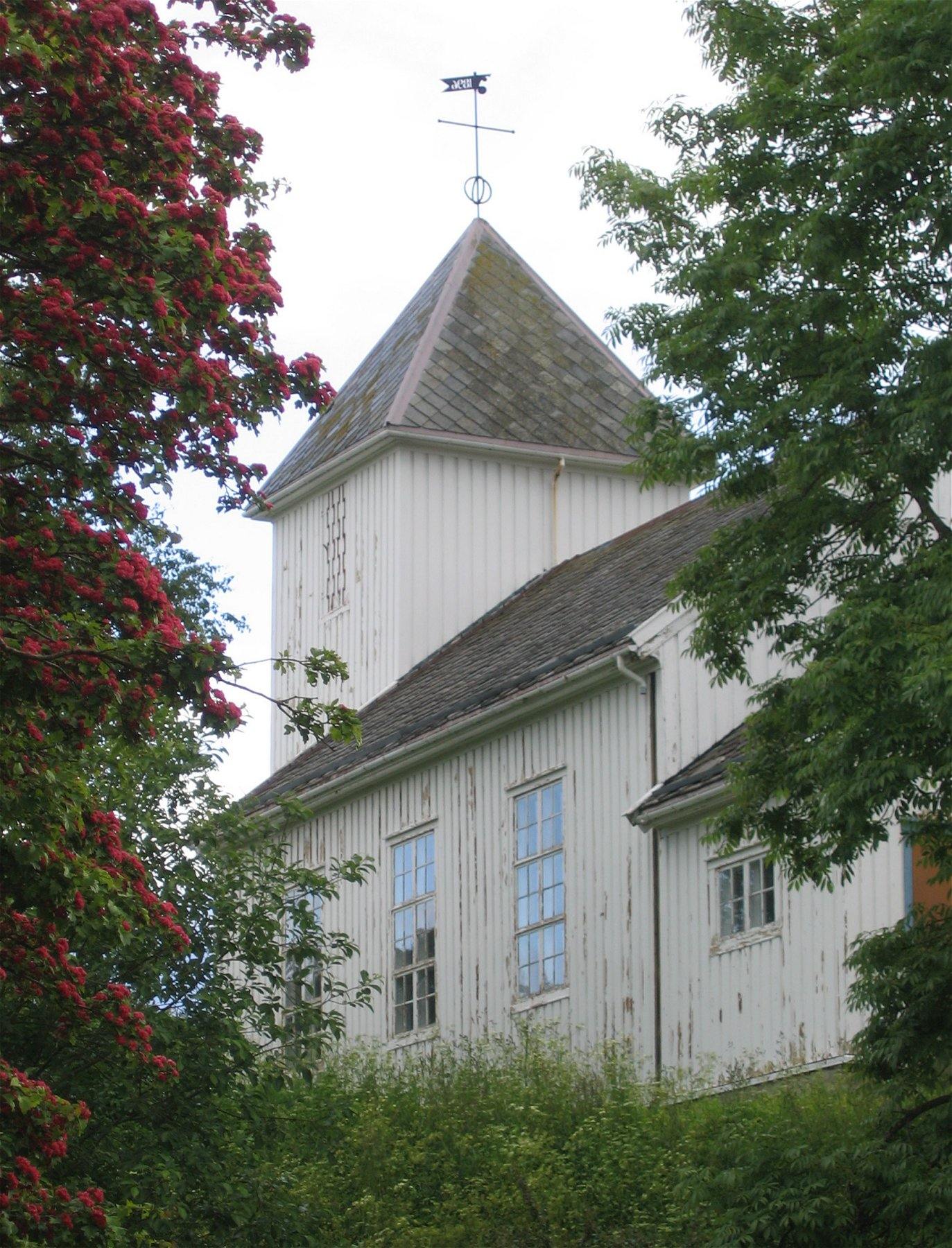 Rørvik, Norwegen